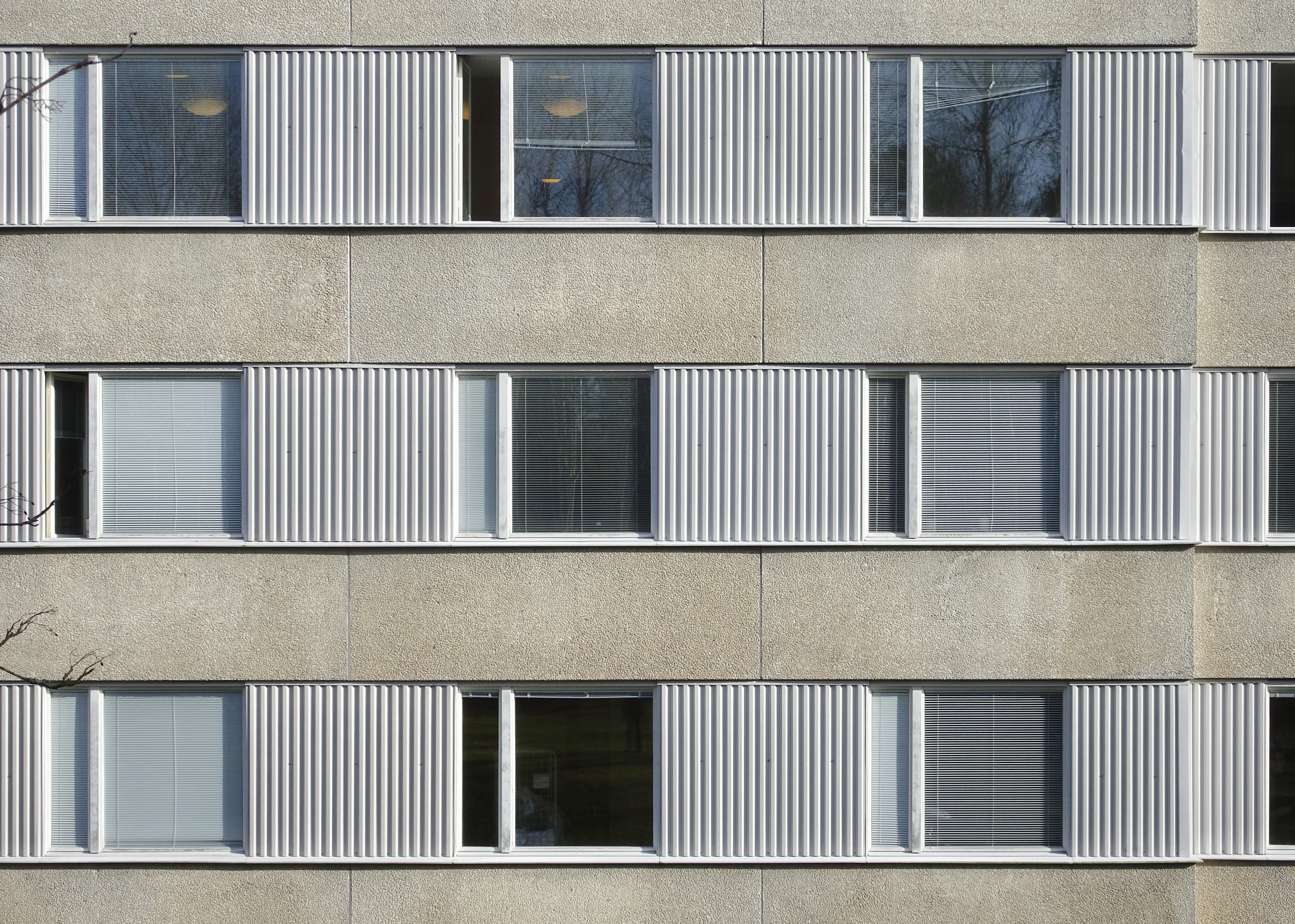 Vårbergs sjukhem byggdes 1970 som ett sjukhus, ritat av arkitekten Ervin Pütseps arkitektkontor. 1994-1996 byggdes det om till ett sjukhem för äldre med den verksamheten avvecklades 2010.